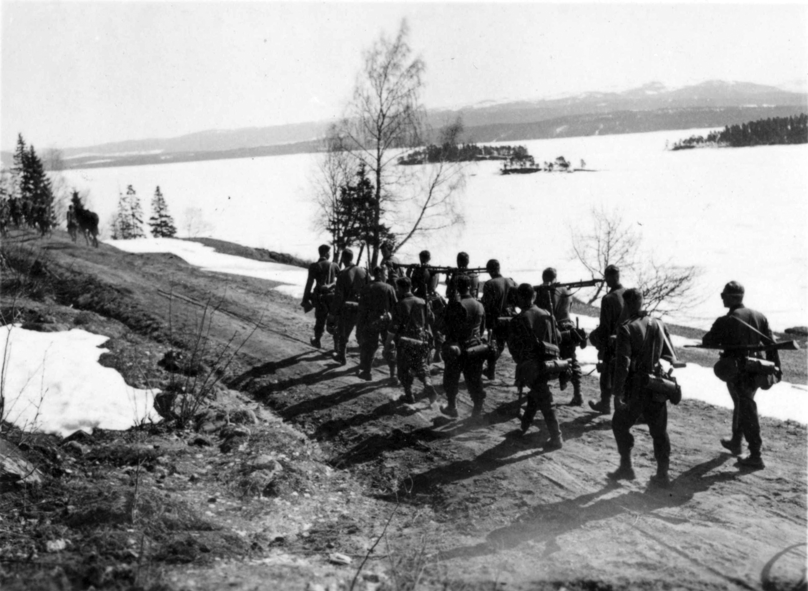 Snåsavatnet Tittel / Title: Snåsavatnet Dato / Date: 4. mai 1940 Fotograf / Photographer: Karl Marth Sted / Place: Snåsa, Trønderlag, Norge Eier / Owner Institution: Arkiv i Nordland Lenke / Link: Arkiv i Nordland Arkivreferanse /Archive reference: AIN.NA143.0102 Fra Dag Skogheims Privatarkiv Tekst bak på bildet: Odd Grønlie: Dette kan være den innerste del av Snåsavatnet. I bakgrunnen Skjækerfjella. Østerriske bergjegere på vei mot Snåsa Nordland County Archives Native nameArkiv i NordlandLocationBodøCoordinates67° 17′ 24.37″ N, 14° 33′ 34.77″ E Established1995Web page control : Q11958968 institution QS:P195,Q11958968